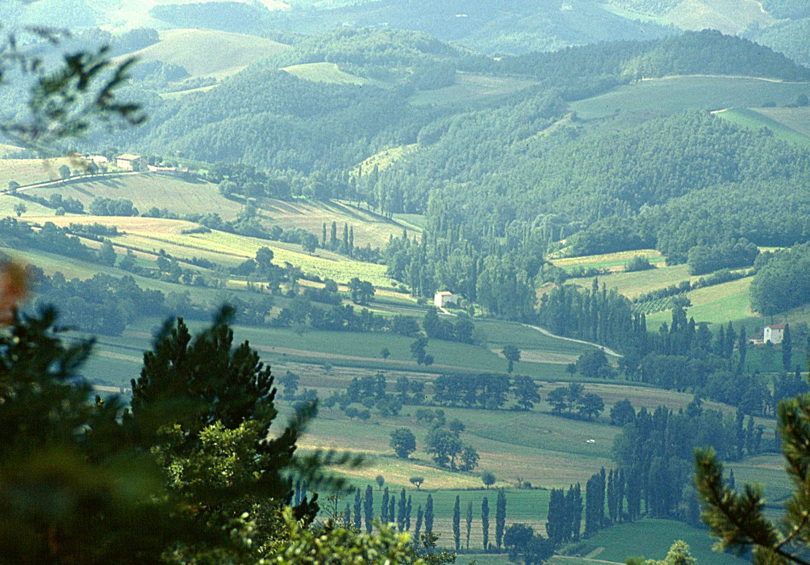 Landschaft in den Marken